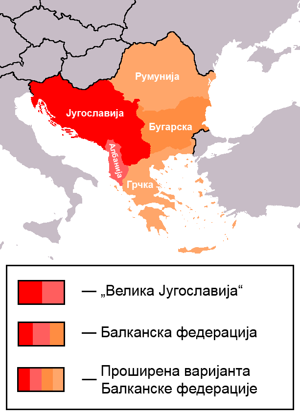 Projekat Balkanska federacija